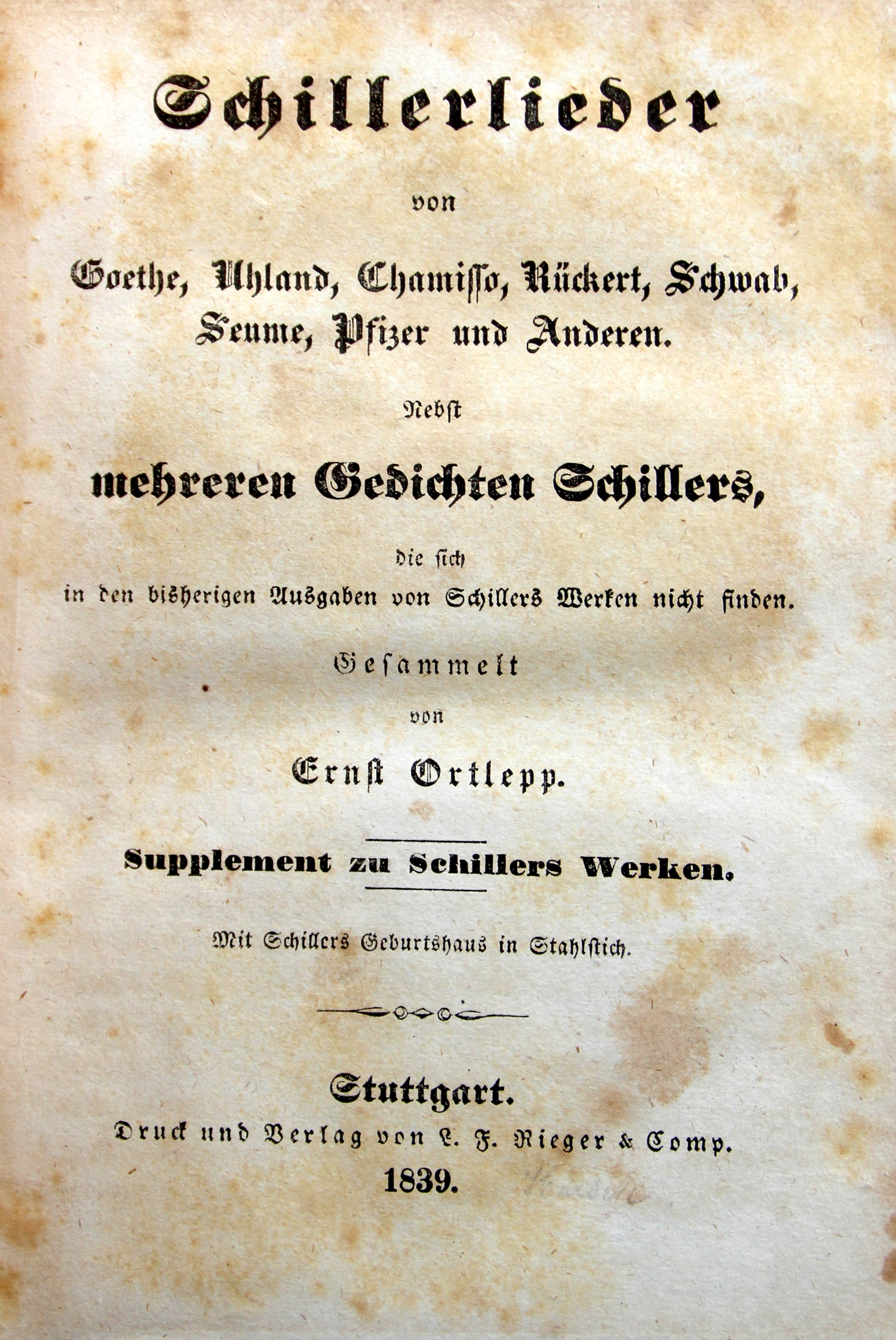 Friedrich Schiller Schillerlieder